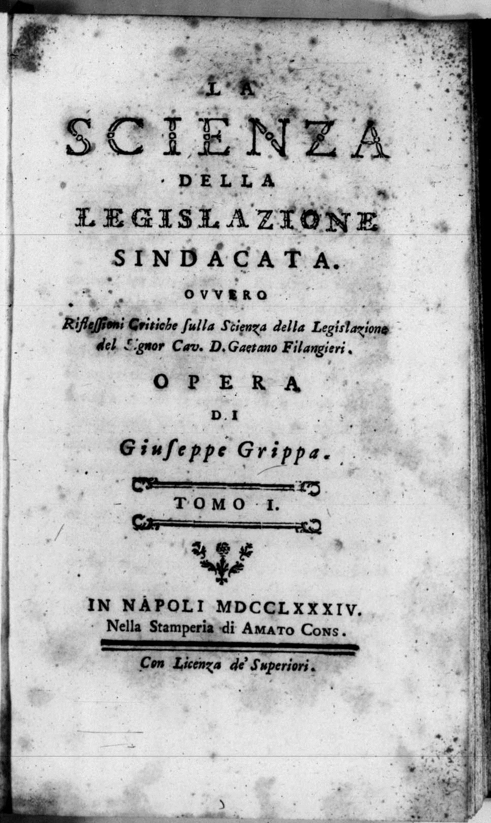 Frontespizio